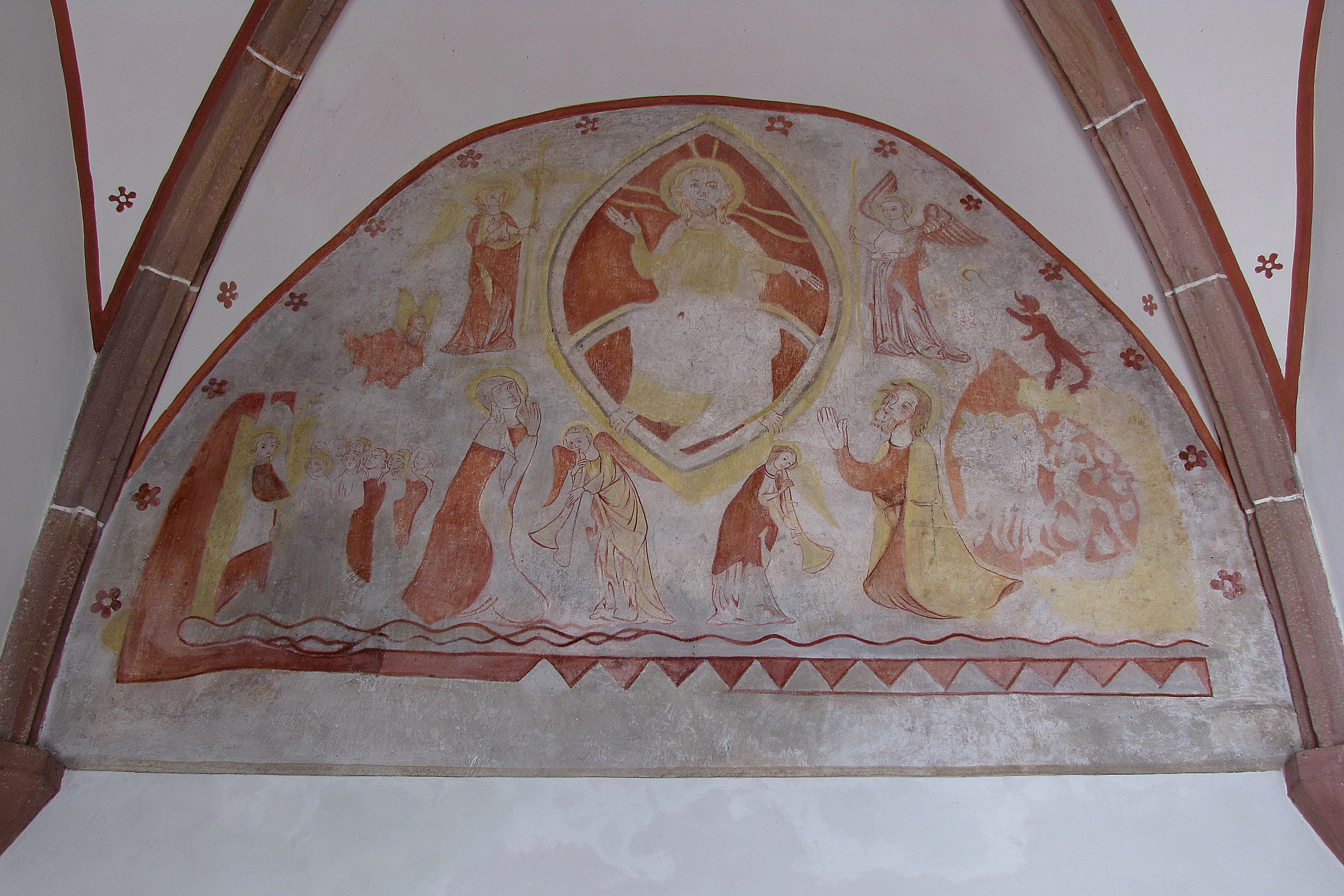 Alsace, Bas-Rhin, Église Saint-Rémi d'Itterswiller (PA00084756, IA00115366). Fresque gothique "Jugement dernier" (XIVe)